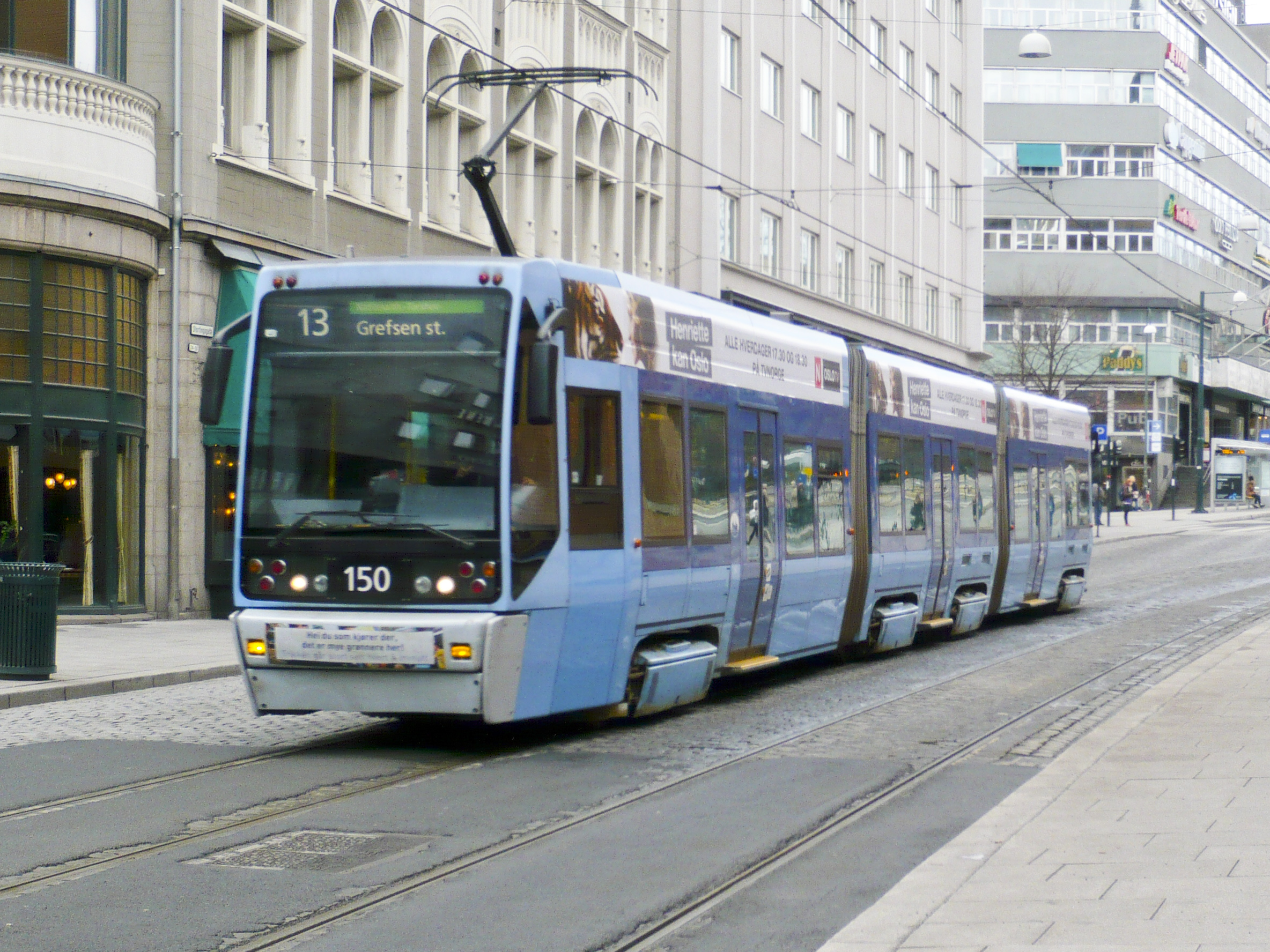 Oslo Tram